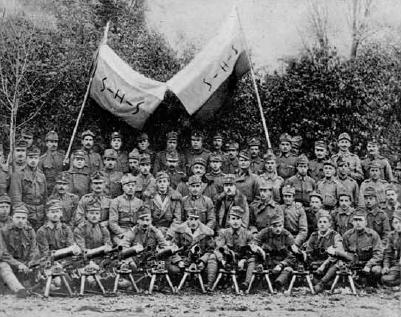 Slovenski vojaki v Tiraspoli pri Odesi. V ozadju dve jugoslovanski zastavi, ki so ju vojaki razvili jeseni 1918 še v okviru avstro-ogrske vojske (!).